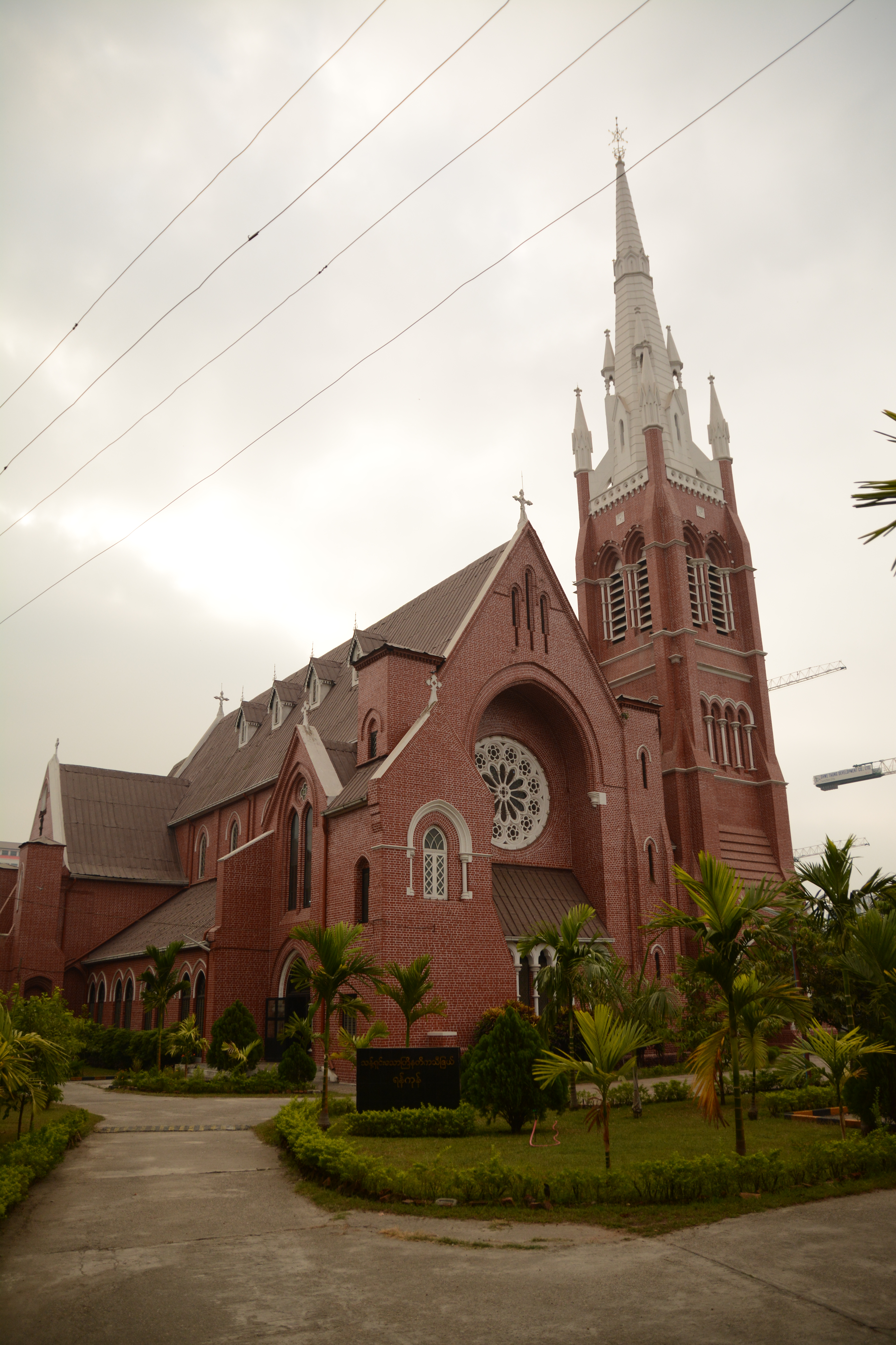 Holy Trinity Cathedral